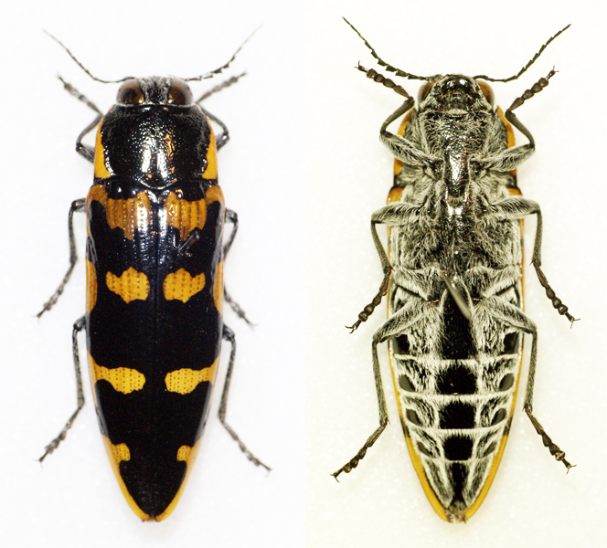 Buprestidae - In collection